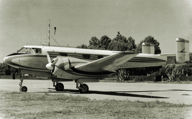 Avión de la Fábrica Militar de Aviones de Córdoba